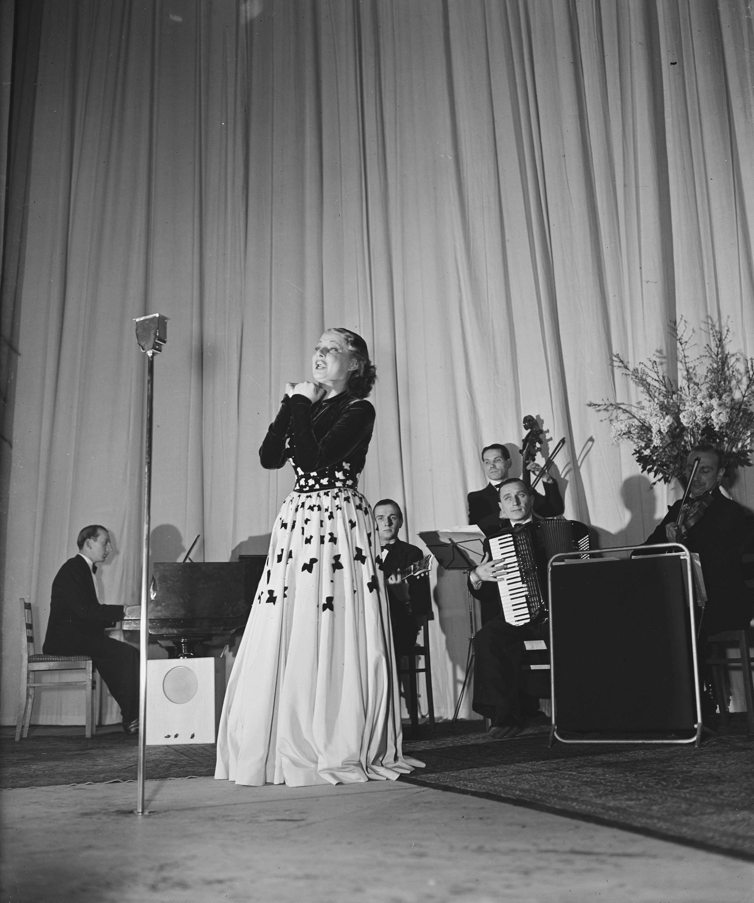 Zangeres Rina Ketty in City Theater Amsterdam (Nederland) Annotatie: De Franse zangeres Rina Ketty (1 Maart 1911 - 23 December 1996), haar echte naam was Cesarina Picchetto . Zij trad op met het radioorkest van Malando Datum: 25 januari 1946